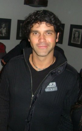 Valentino Lanùs en una reunion con amigos, Mexico D.F.